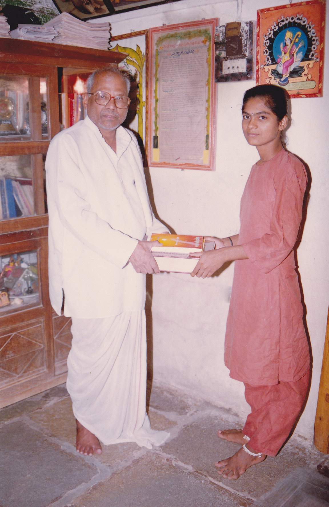 తన ఆధ్వర్యంలో చదువుకుంటున్న వికలాంగురాలికి పుస్తకాలు అందజేస్తున్న ఆచార్య